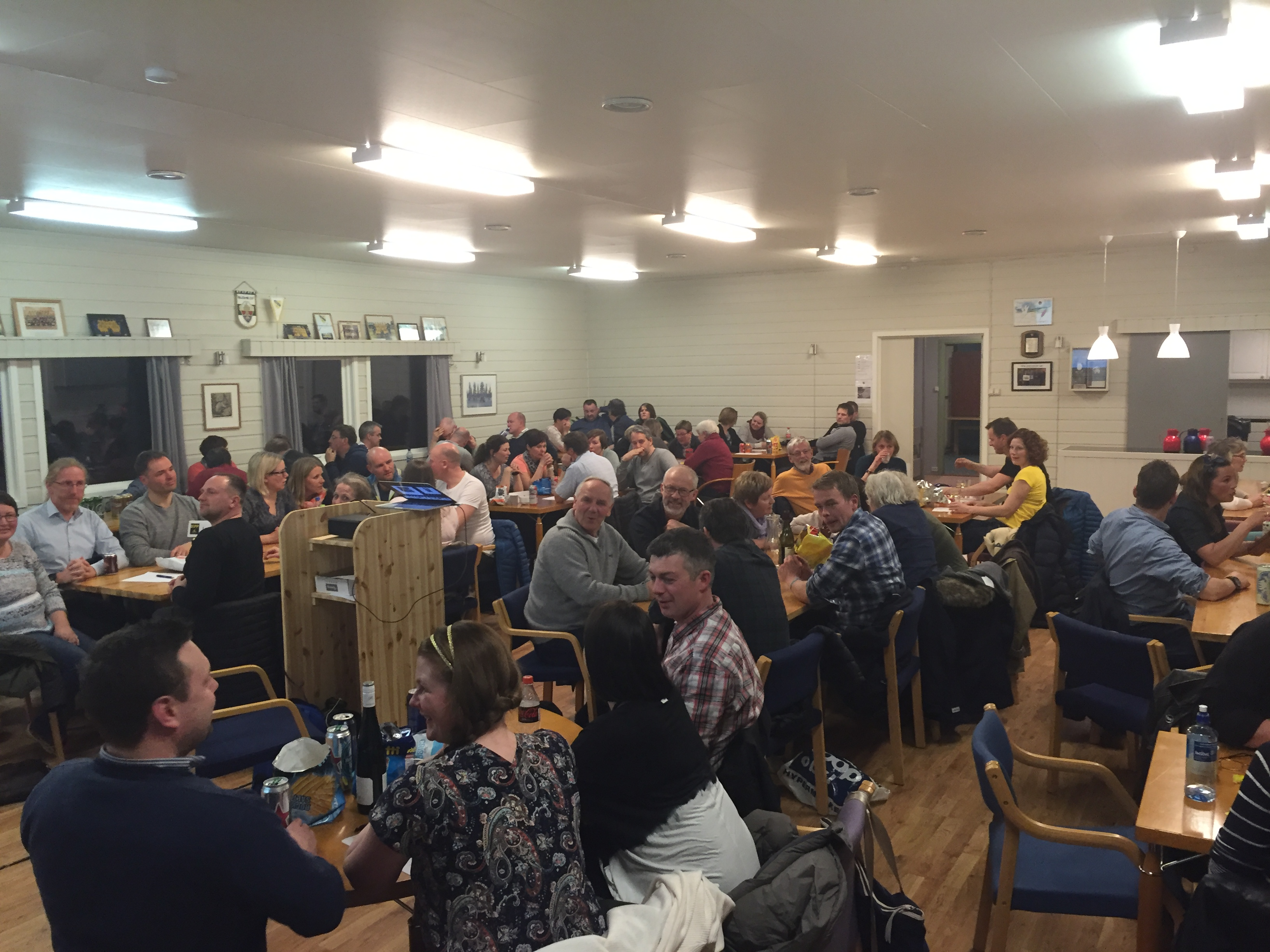 Biri idrettslags klubbhus